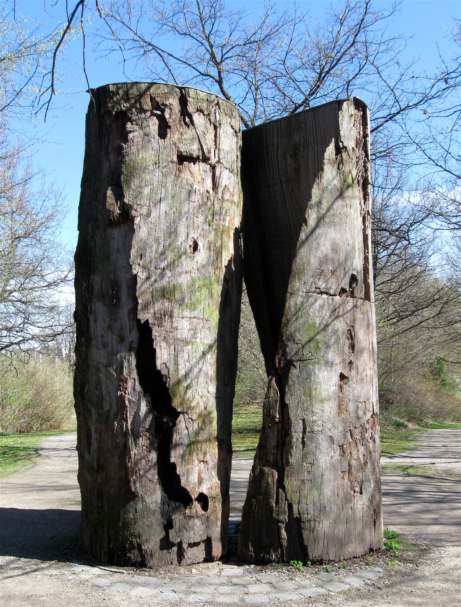 Rudolf Wachter: Zwei Diagonalschnitte, 1983, Holzskulptur im Westpark, München